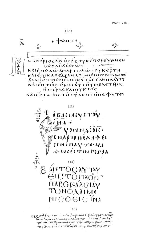 VIII plate with fragments of facsimile editions